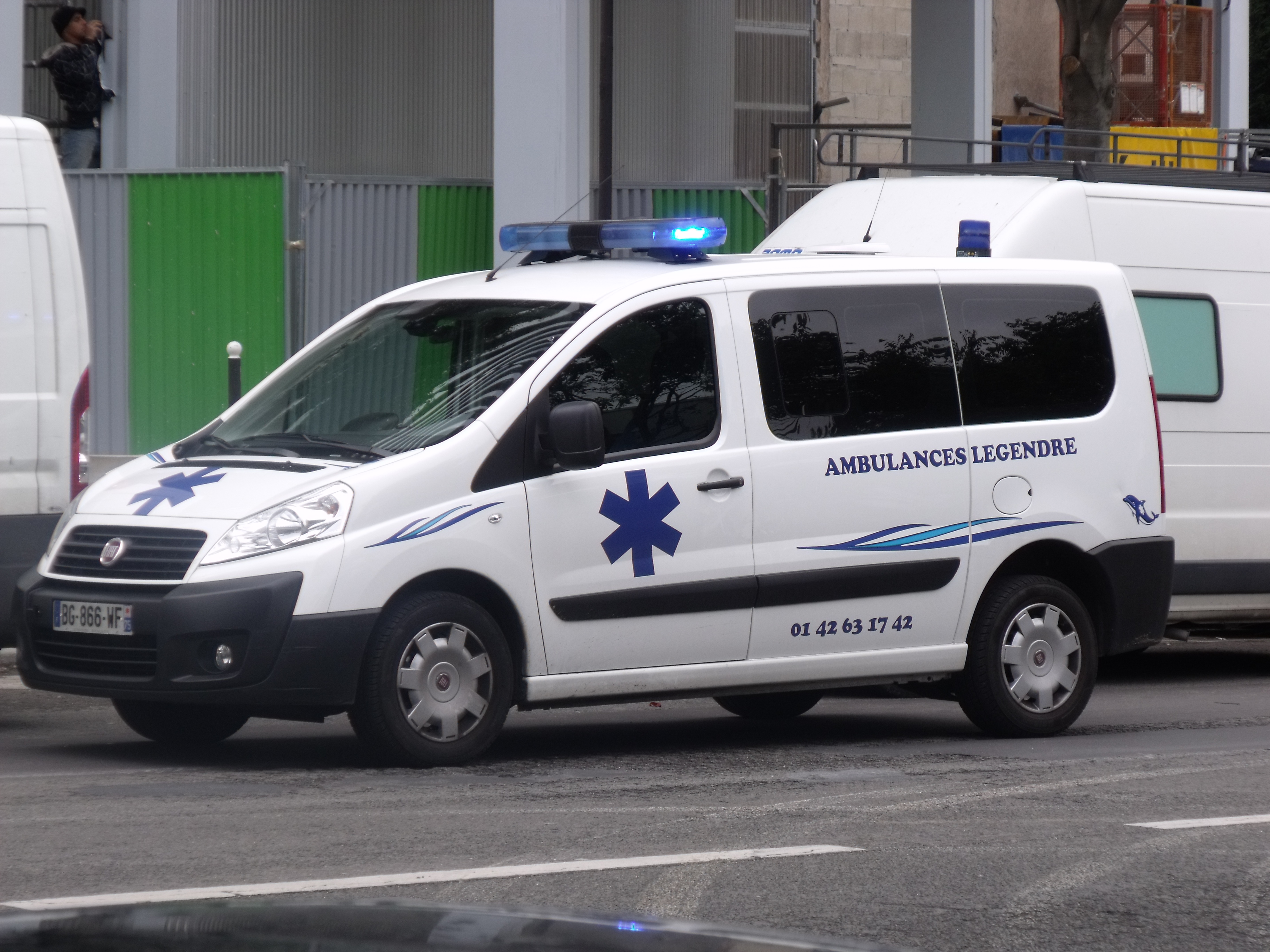 Ce véhicule est vu ici sur la voie publique.